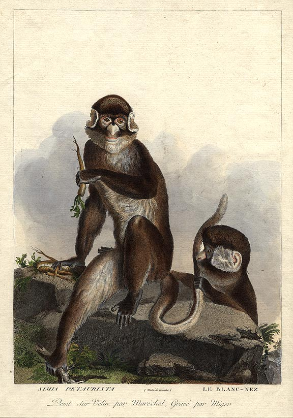 "Simia Petaurista / Le Blanc-Nez". (Cercopithecus petaurista / Hocheur blanc nez du Bénin.) Plate by Simon Charles Miger after Nicolas Maréchal (1753-1803) from "La Ménagerie du Muséum national d'histoire baturelle" by Bernard-Germain-Étienne de Lacépède, Georges Cuvier & Étienne Geoffroy Saint-Hilaire (1804).